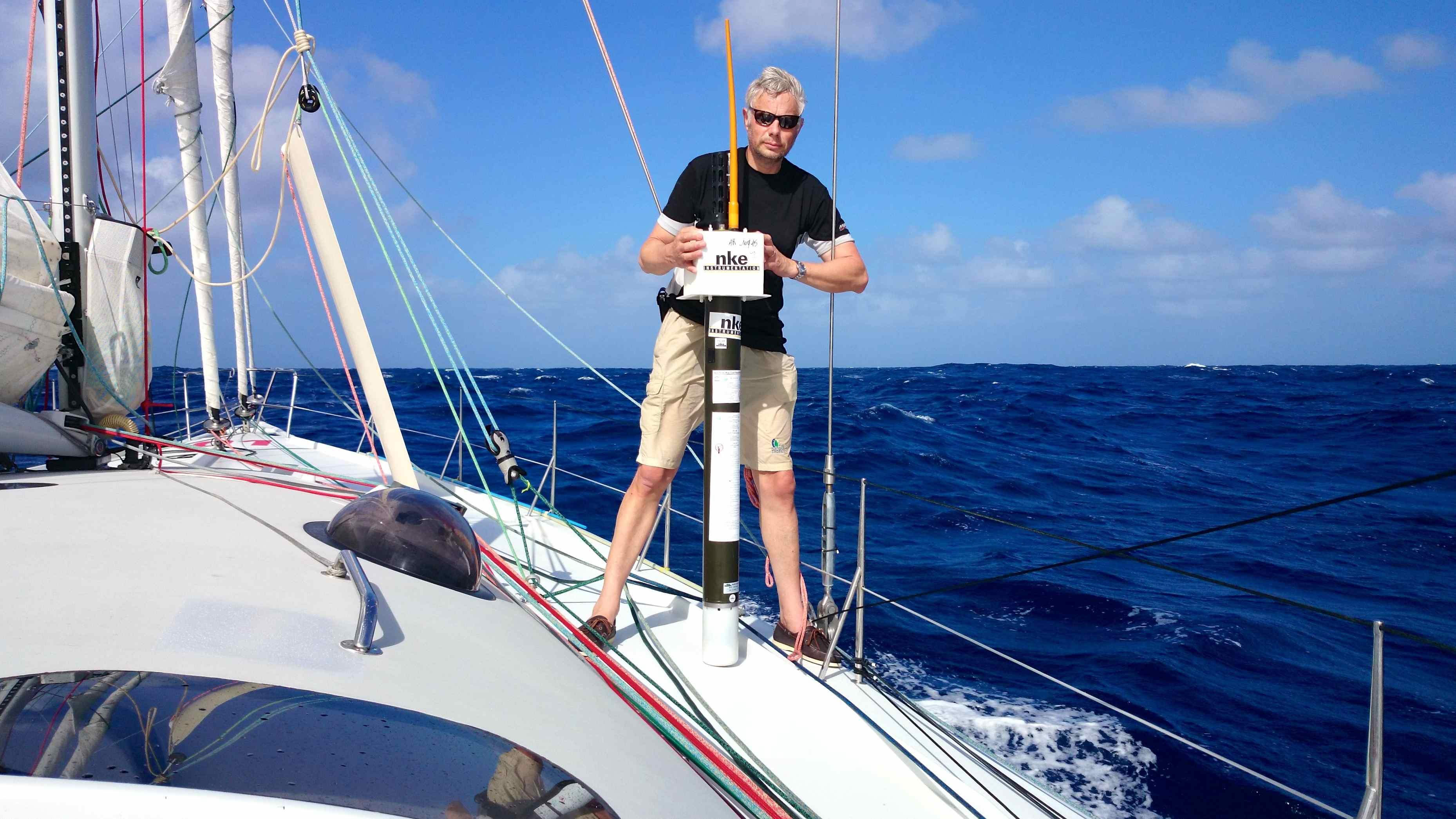 Déploiement d'engins scientifiques en Atlantique Nord - Décembre 2013